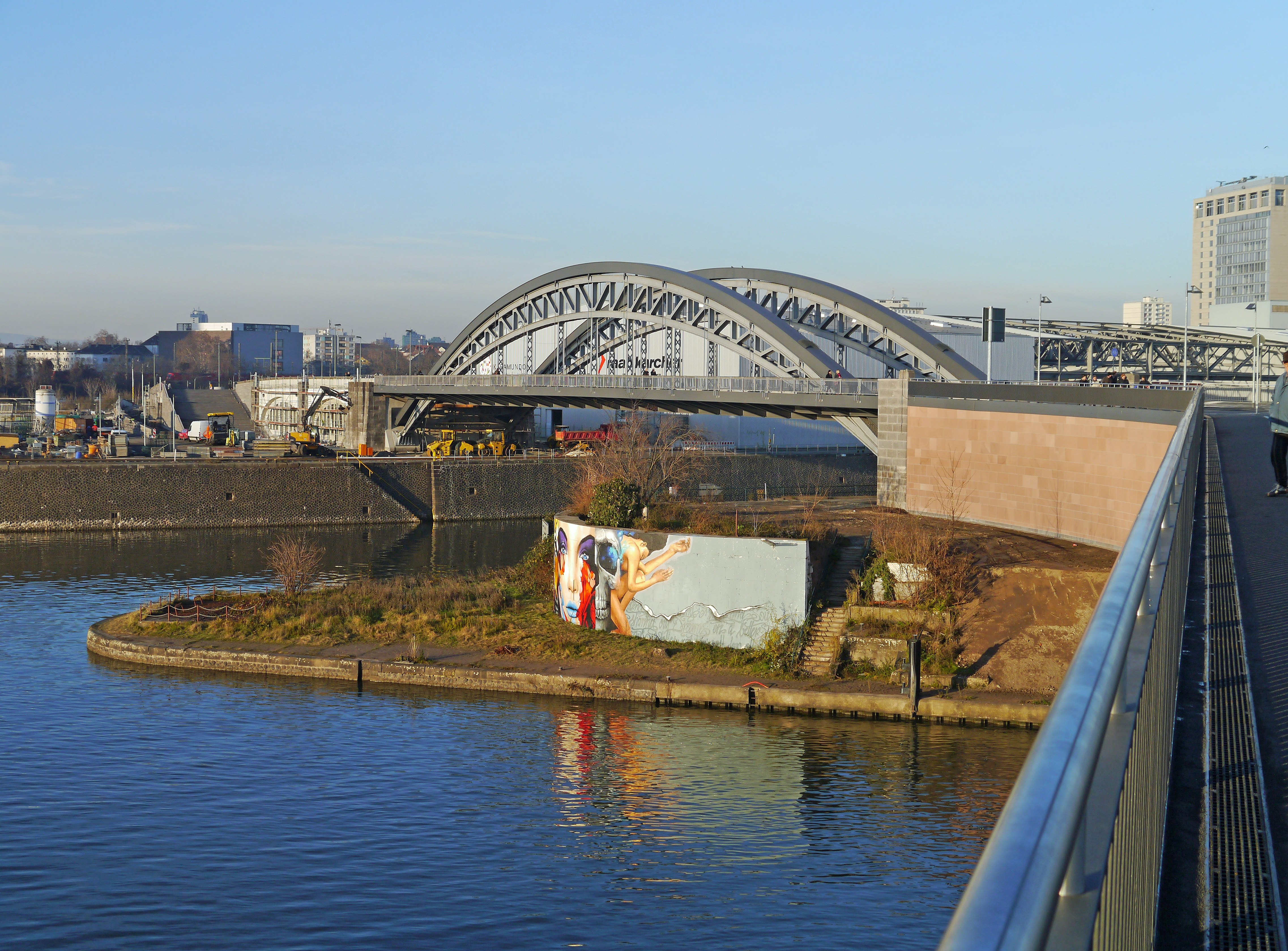 Die Honsellbrücke (2013), gesehen von der Osthafenbrücke in Frankfurt am Main